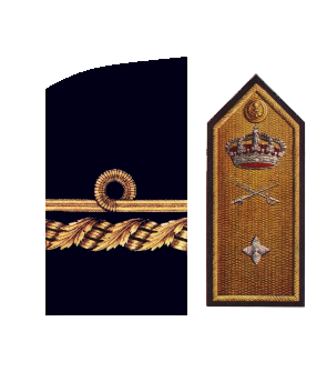 Divisas de Contralmirante de la Armada Española. Bocamanga (Izda.) y pala (Dcha.)